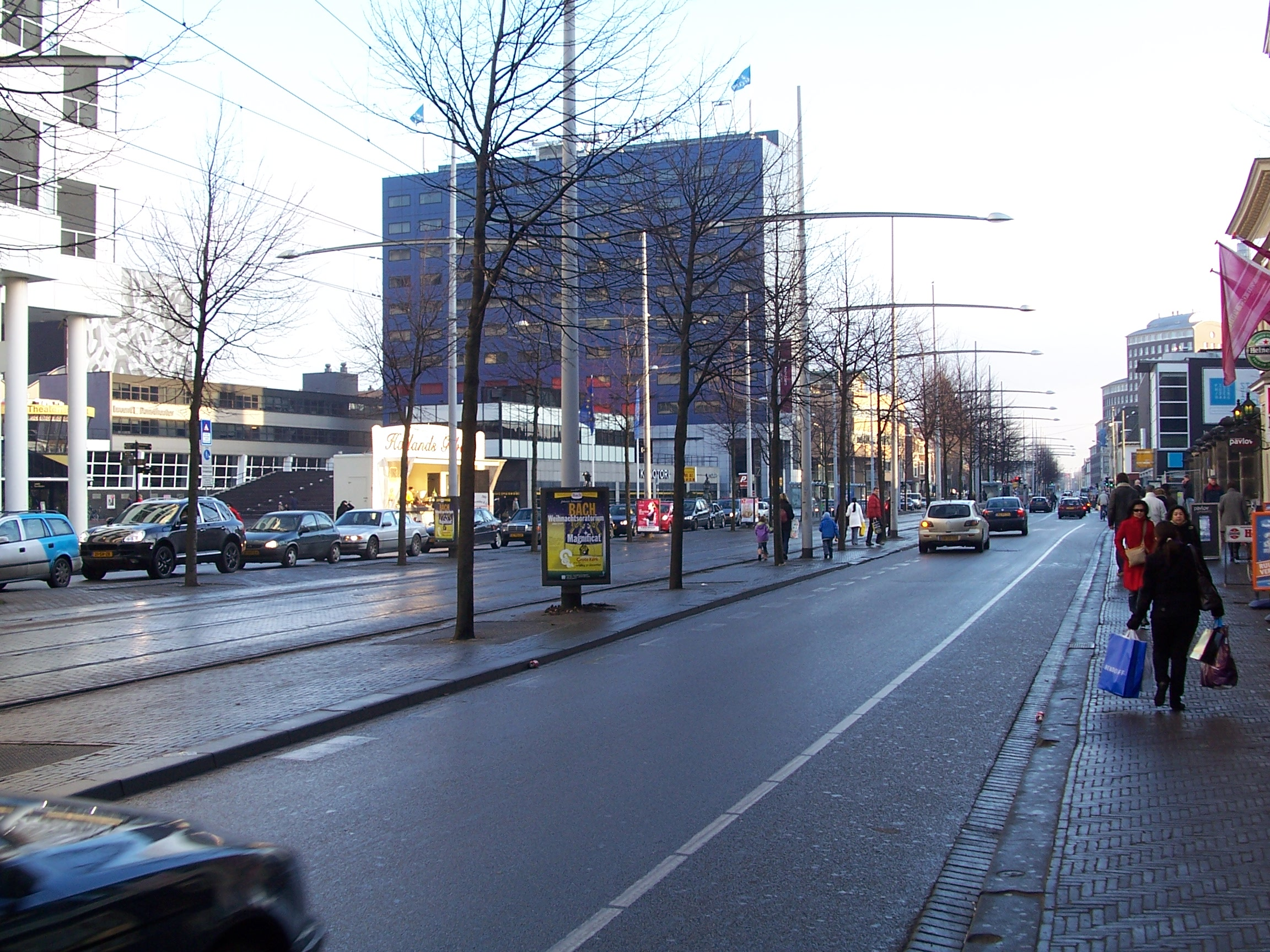 Spui - Den Haag - 2007